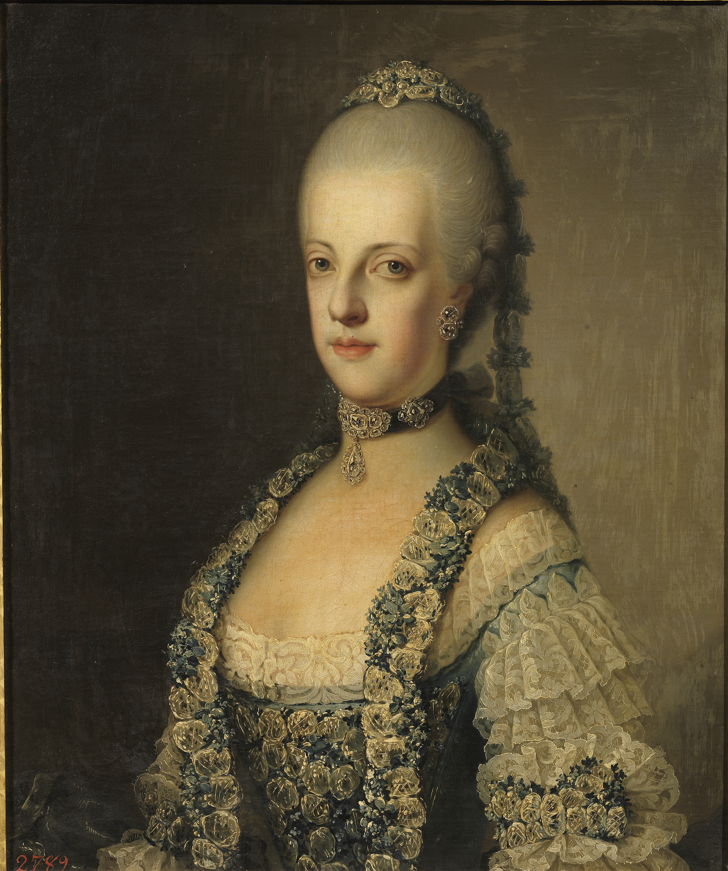 María Carolina de Habsburgo-Lorena, reina de Nápoles